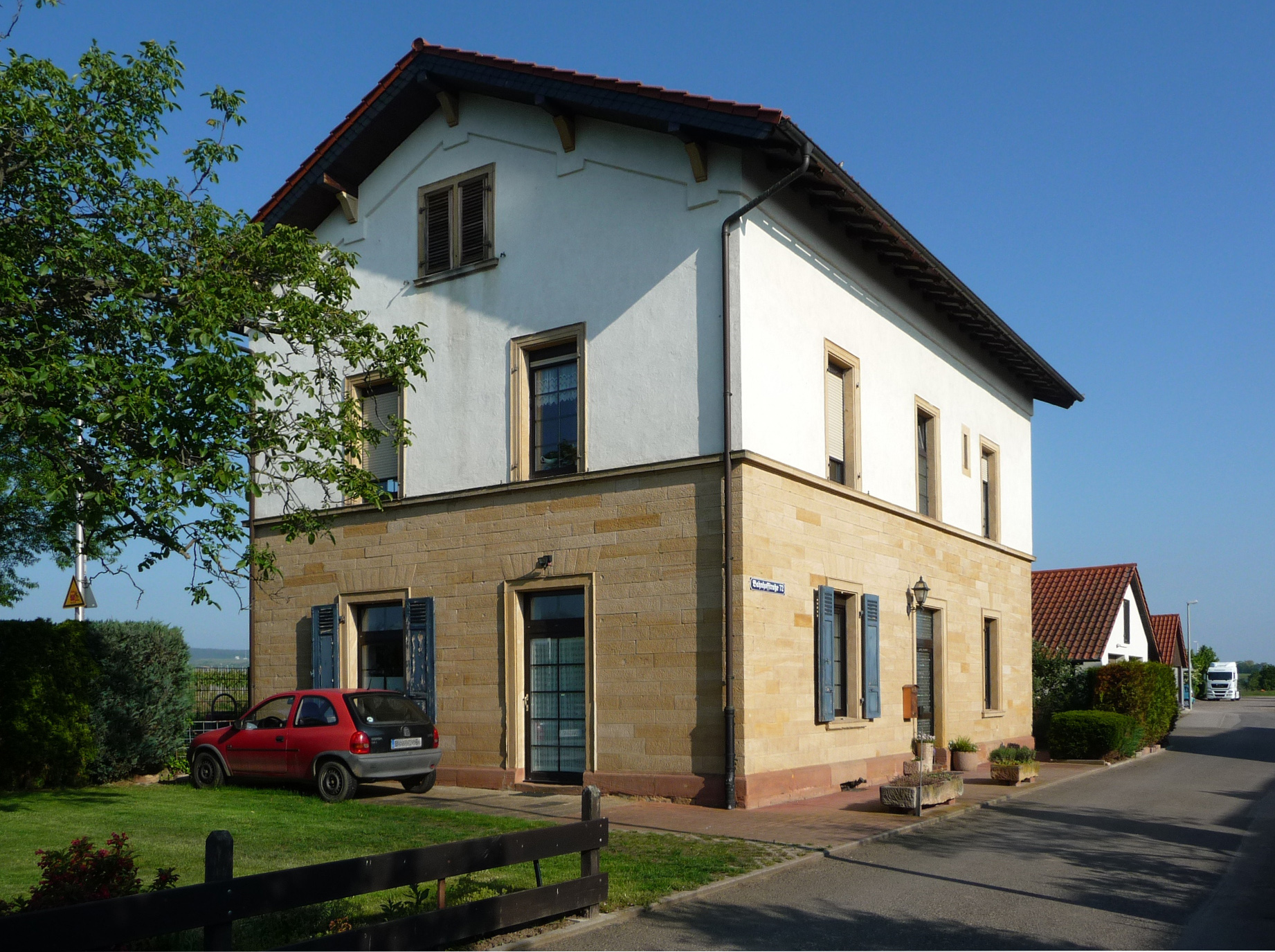 Erpolzheim ist eine Ortsgemeinde im Landkreis Bad Dürkheim in Rheinland-Pfalz.